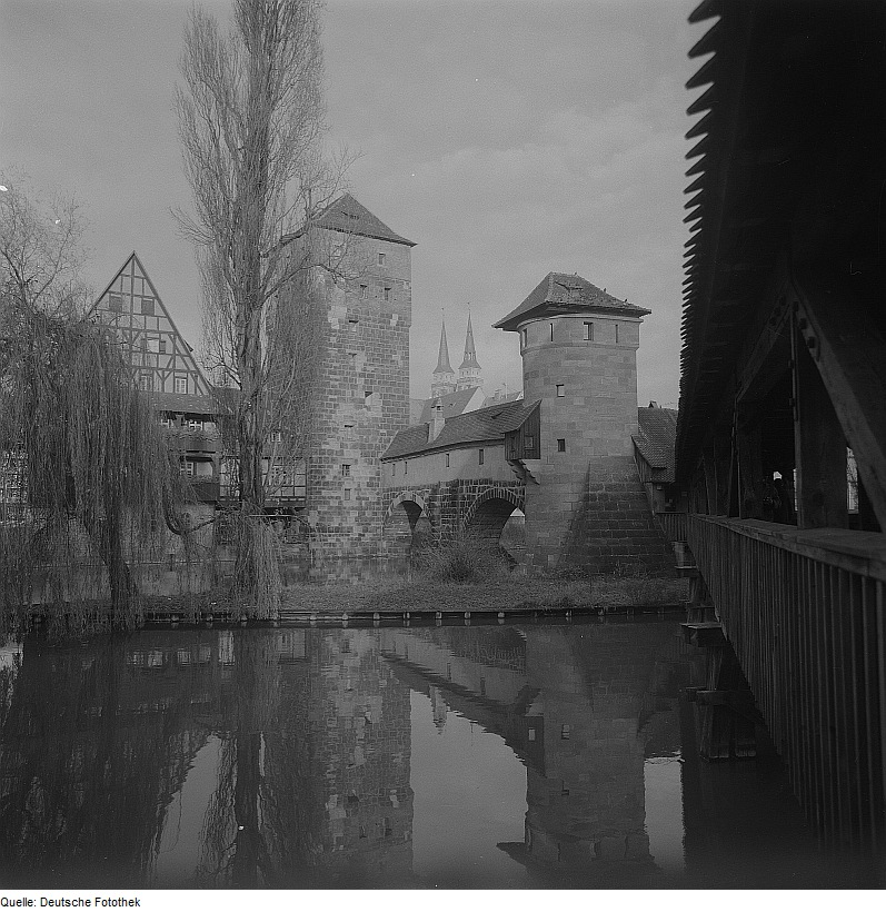 Original image description from the Deutsche FotothekNürnberg. Weinstadel (15. Jh.), Wasserturm und Henkersteg, Blick über die Pegnitz